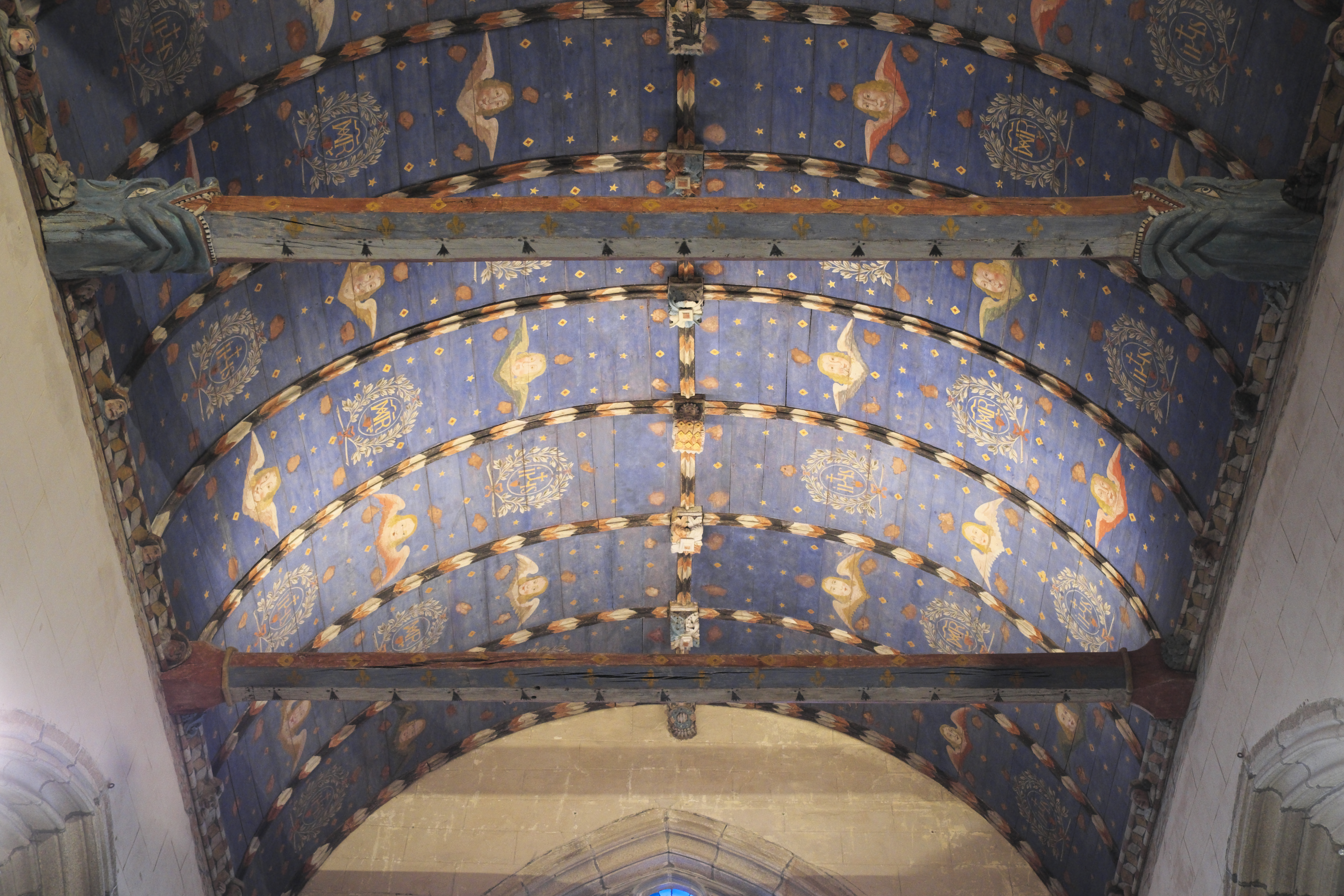 Katholische Pfarrkirche Saint-Yves in La Roche-Maurice im Département Finistère (Region Bretagne/Frankreich), bemalte Holzdecke